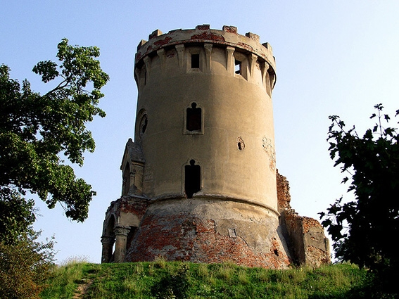 Ardud - Erdős